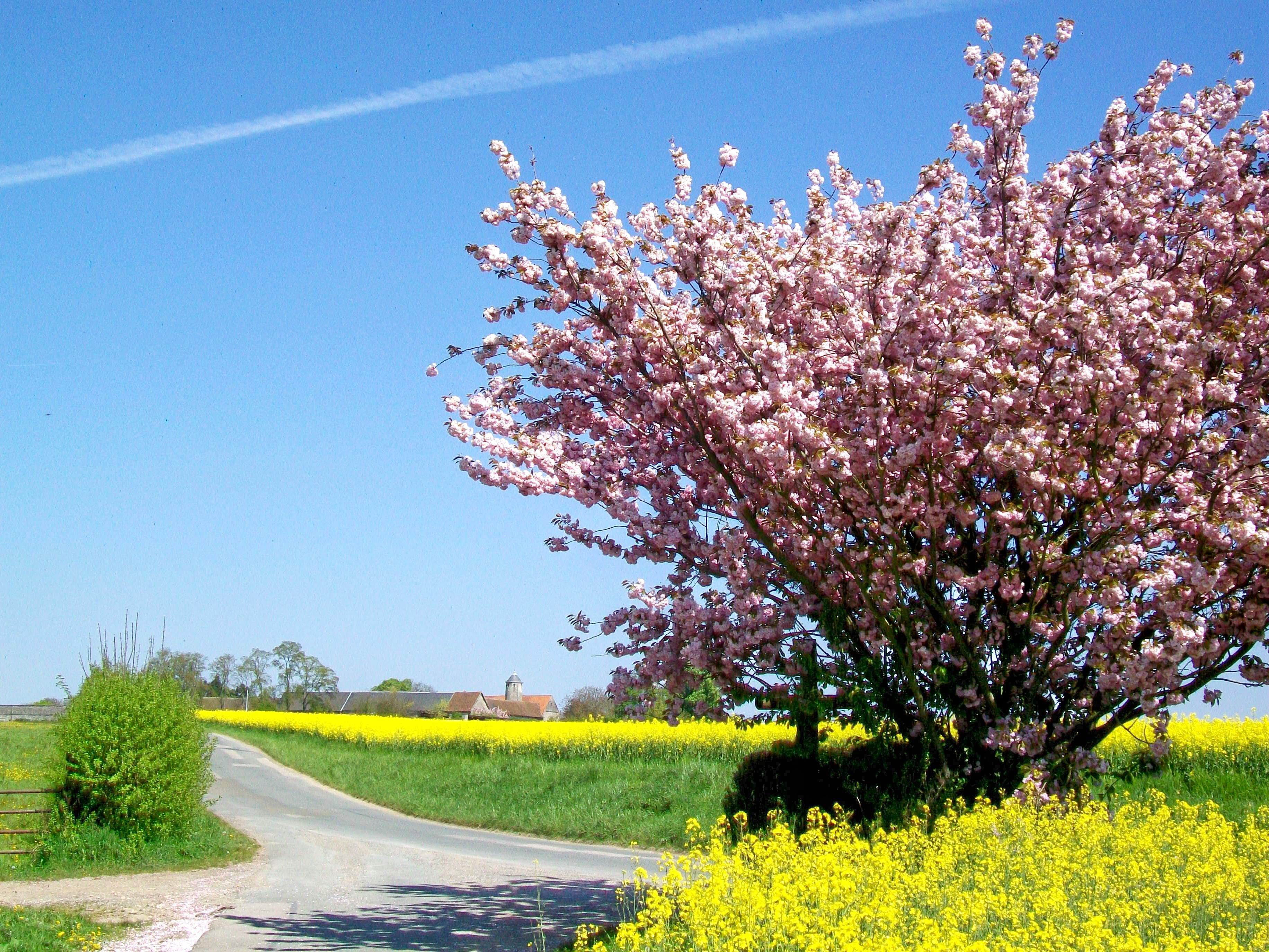 Vue sur Balagny-sur-Aunette avec la tour médiévale de la ferme de Balagny, depuis le chemin rural n° 19 en direction de Chamant.